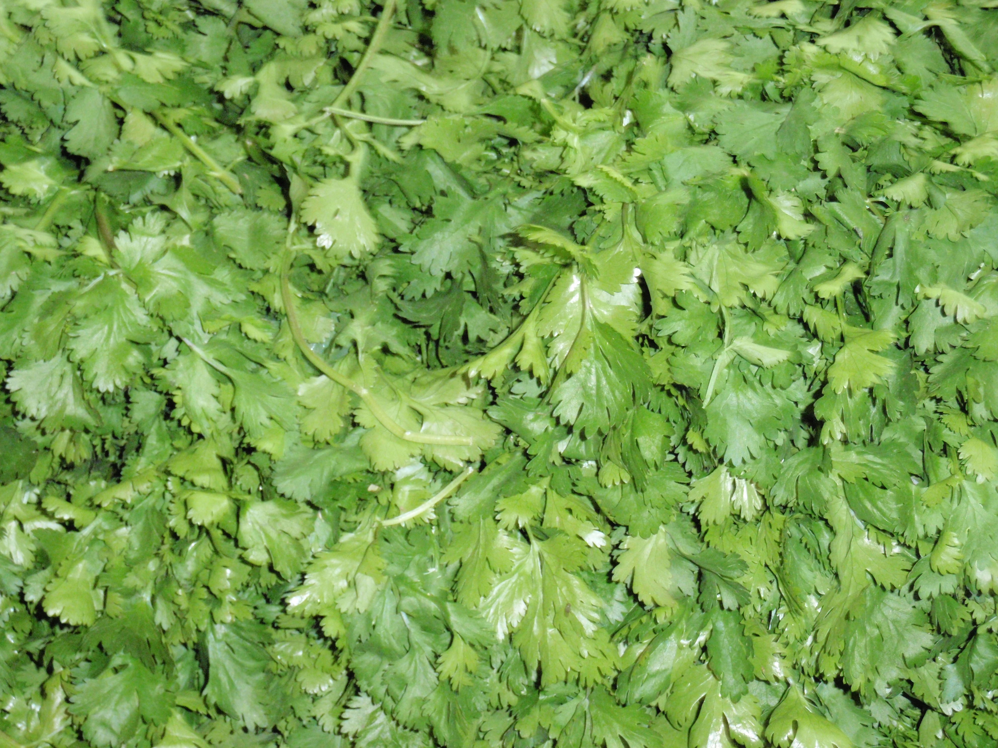 Shuk Hsayarim ירקות בשוק הסיירים